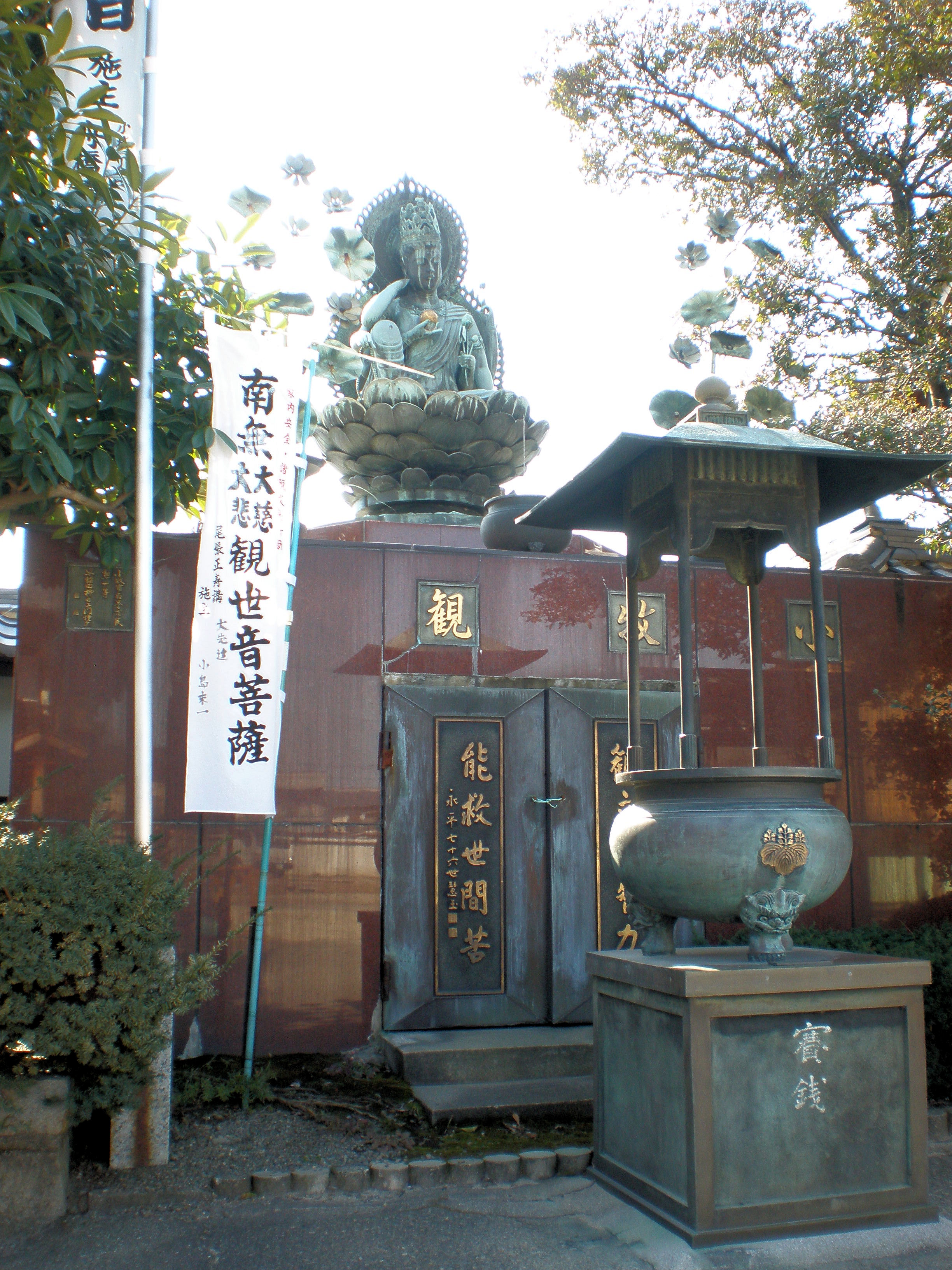 愛知県小牧市小牧にある玉林寺の観音像